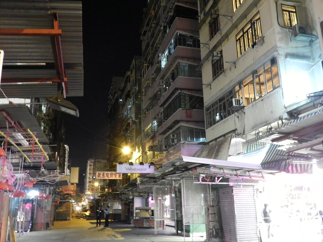 攝於弼街與花園街街口,可見災後第七天晚上的花園街仍被封鎖